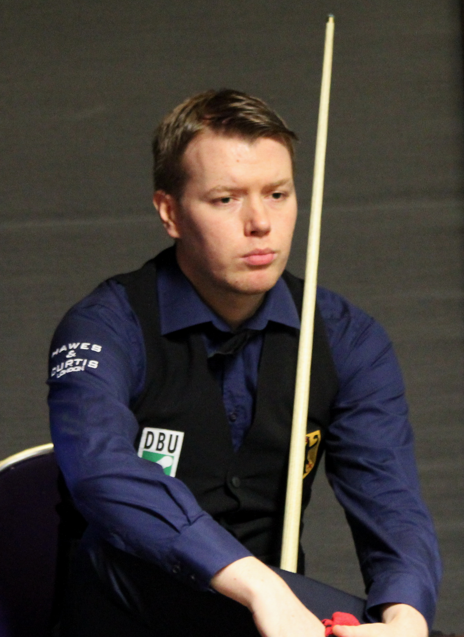 Patrick Einsle beim Paul Hunter Classic 2016